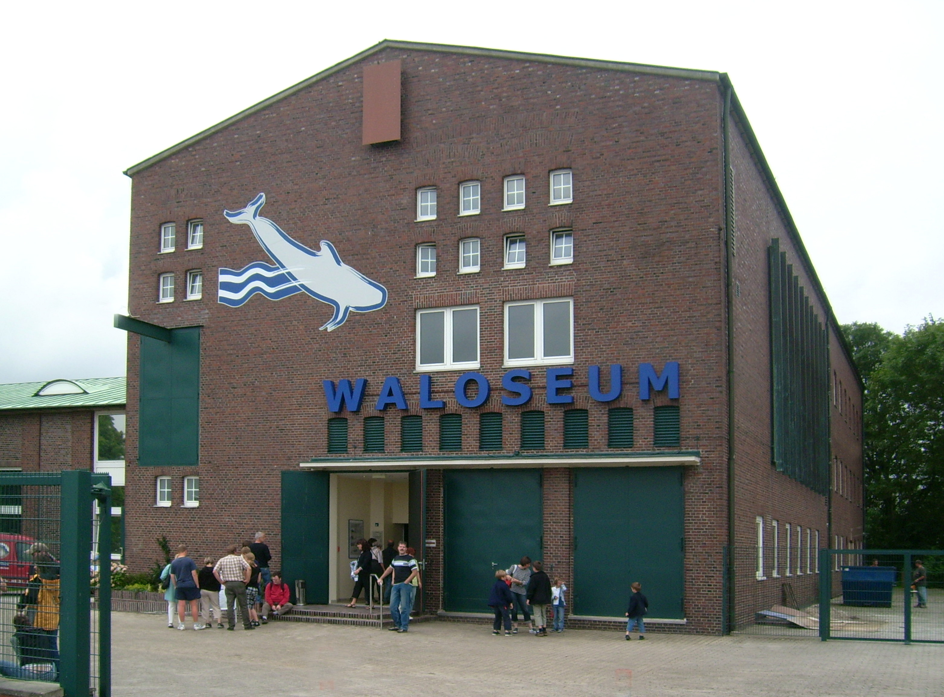 Walmuseum in Norddeich, einem Stadtteil der ostfriesischen Stadt Norden; das Gebäude war bis 1964 Betriebsstation des Senders Osterloog.